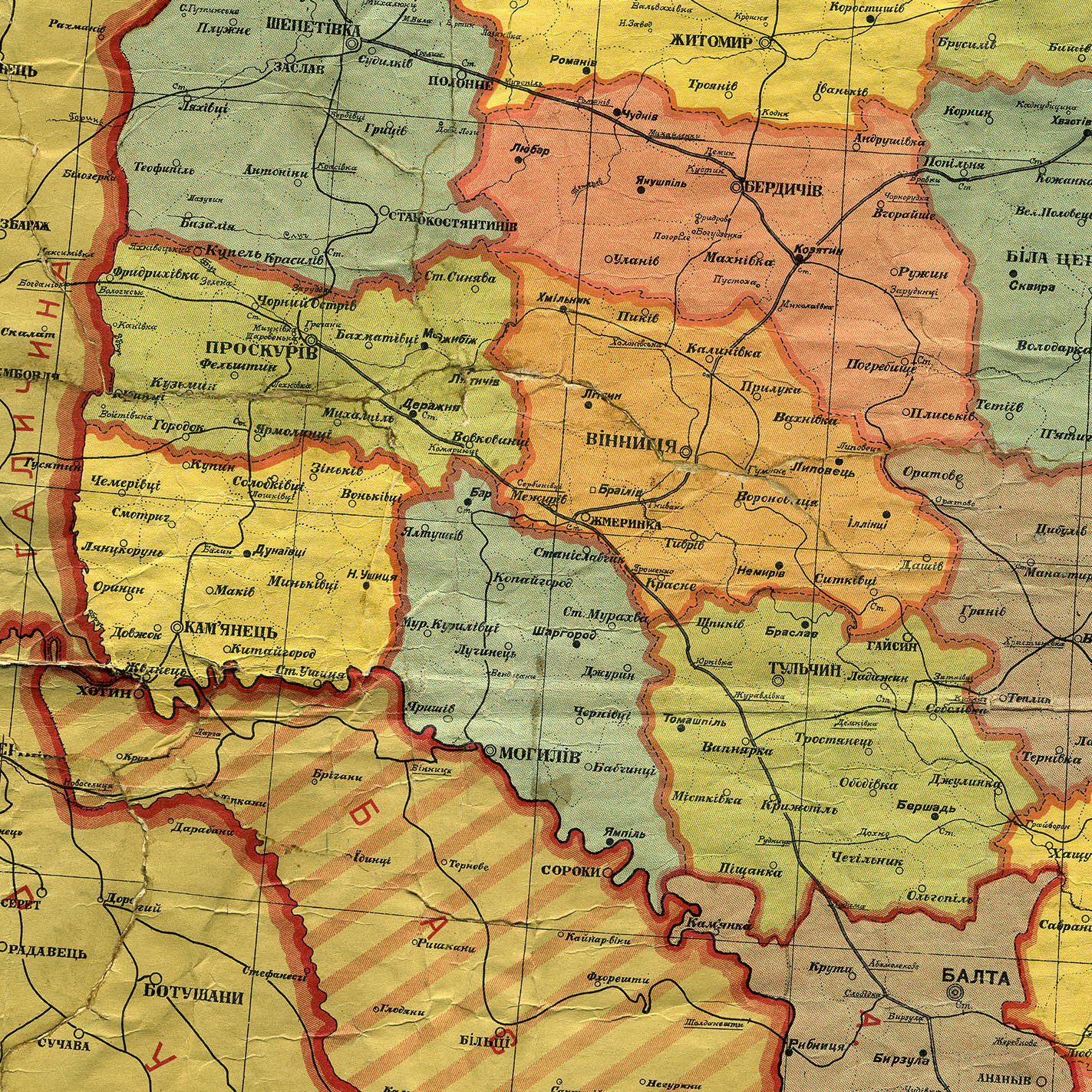 Територія колишньої Подільської губернії, фрагмент мапи Української соц. рад. республіки, адміністративний поділ від 1 жовтня 1925